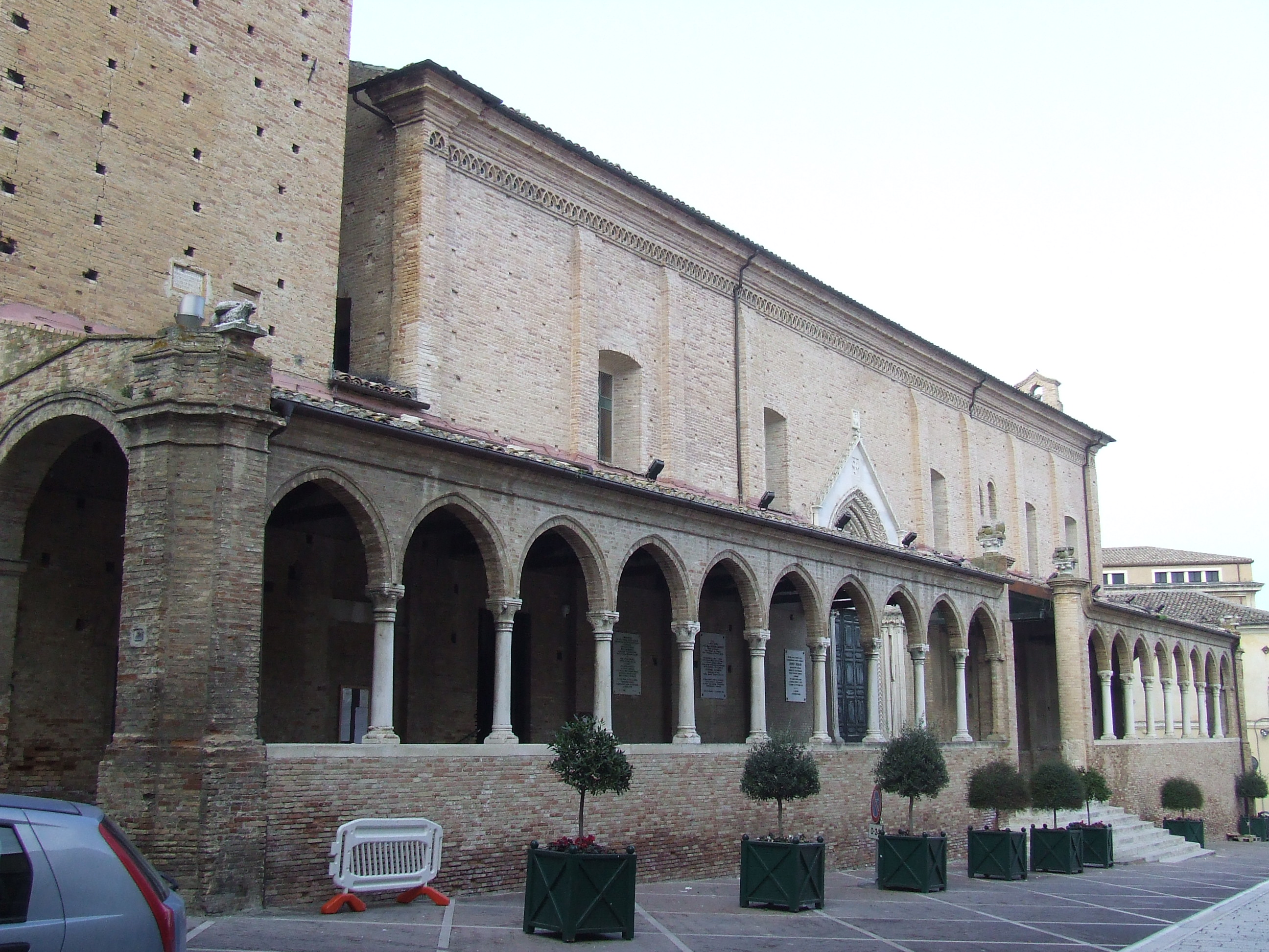 Città Sant'Angelo, collegiata di San Michele Arcangelo